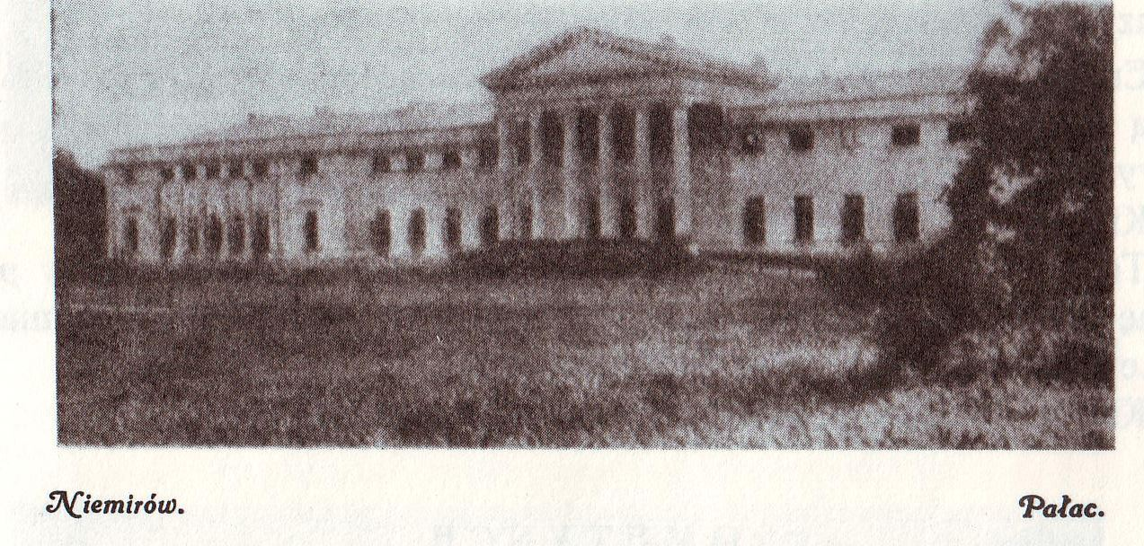 Niemirów